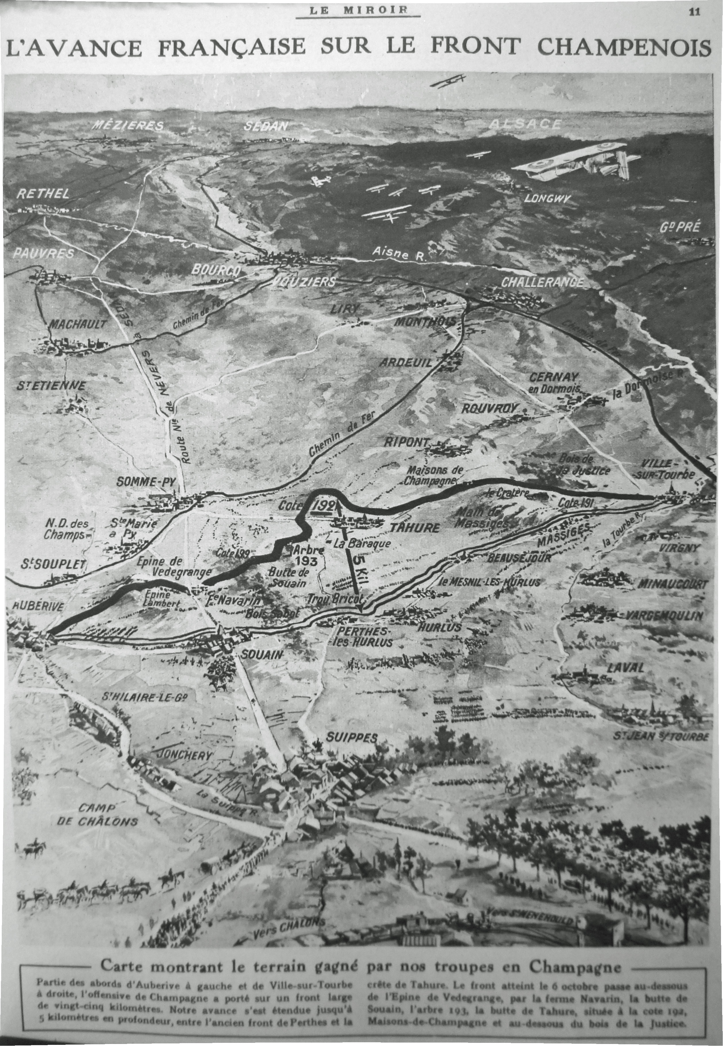 extrait du journal "le miroir".